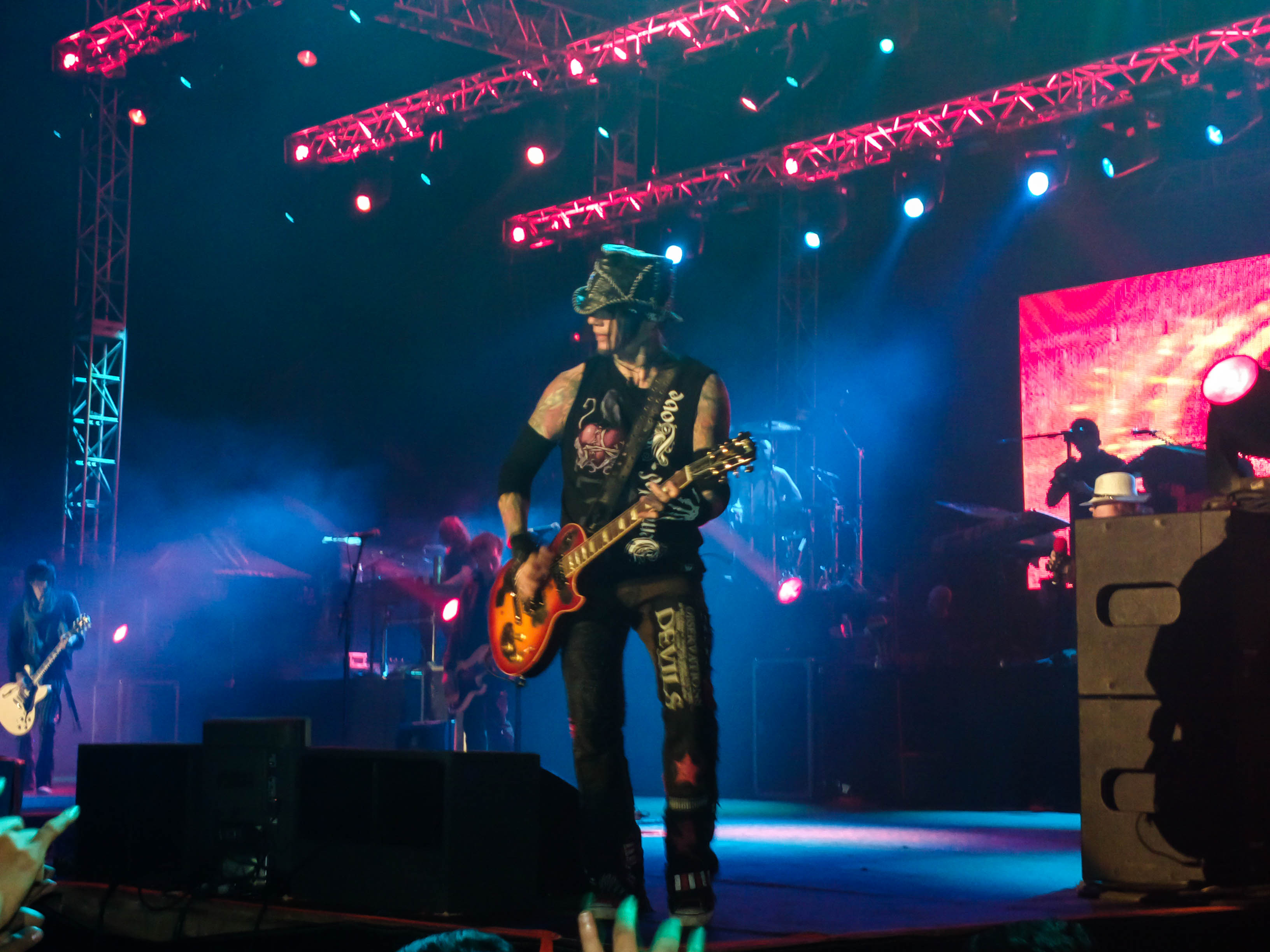 2012-12-07-0137.jpg